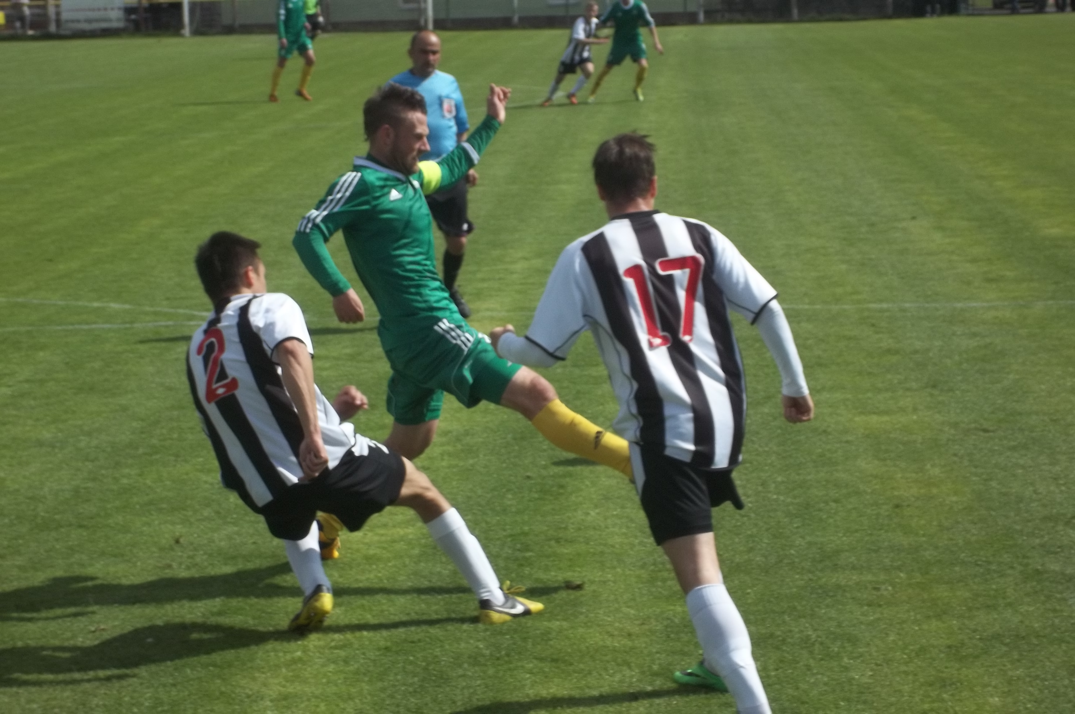 KV horní měcholupy